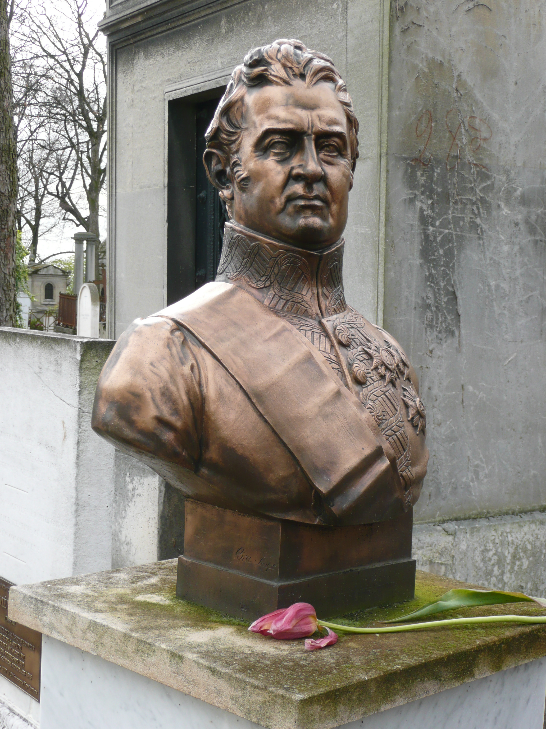 Buste de Francisco Ballesteros au cimetière du Père Lachaise